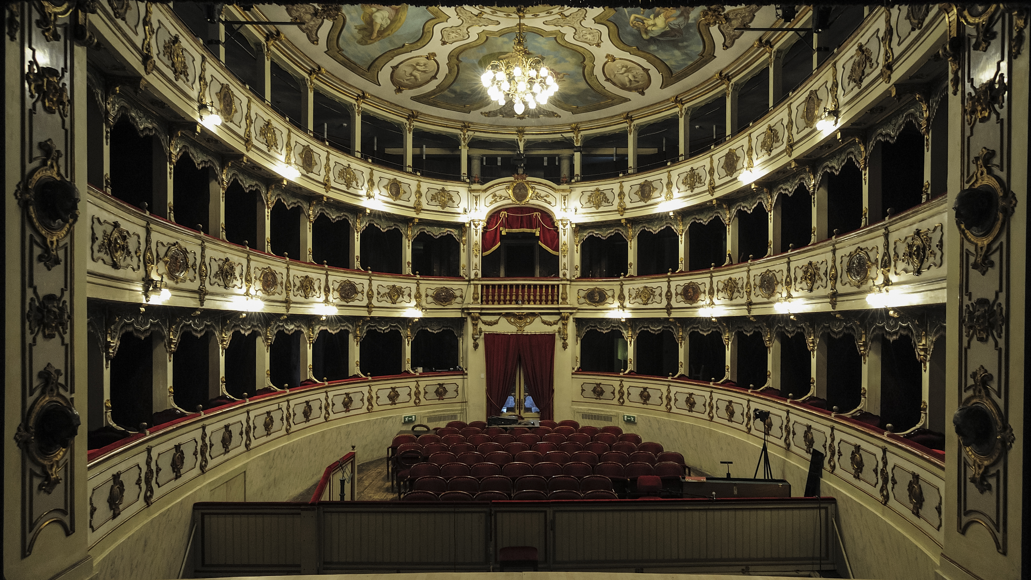 Teatro Giuseppe Verdi (Busseto) This is a photo of a monument which is part of cultural heritage of Italy.